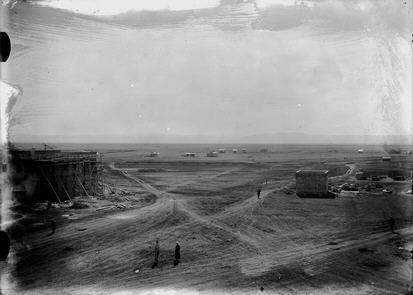 אום גו'ני - דגניה, פנורמה